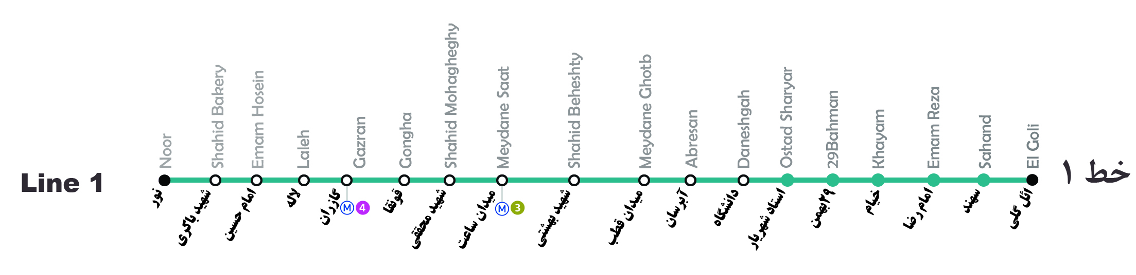 خط یک متروی تبریز با ایستگاههای فعال و در حال ساخت